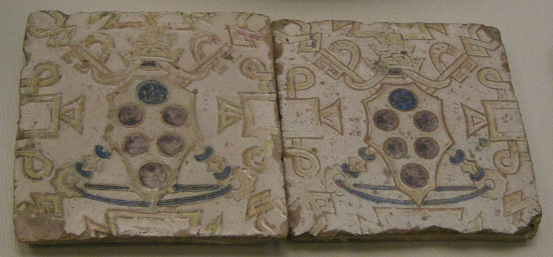 Francisco, niculoso pisano, ceramica di triana, siviglia, piastrelle stemma papale medici, 1513-1521